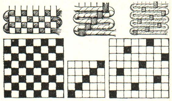 Leinwandbindung, Köperbindung, Attasbindung (2bindig), (5bindig, (8bindig) Die obere Reihe zeigt die Gewebe, die untere die entsprechenden Muster.